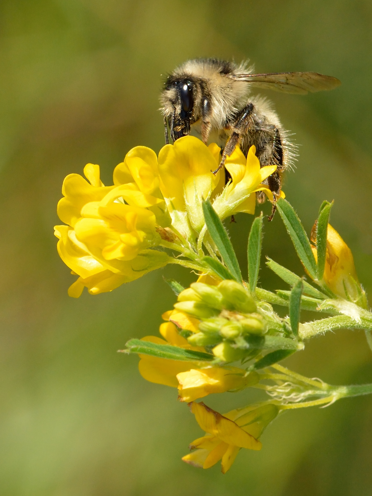 Metsakimalane (Bombus sylvarum) sirp-lutserni õiel (Medicago falcata). Keila aruniit, Loode-Eesti.